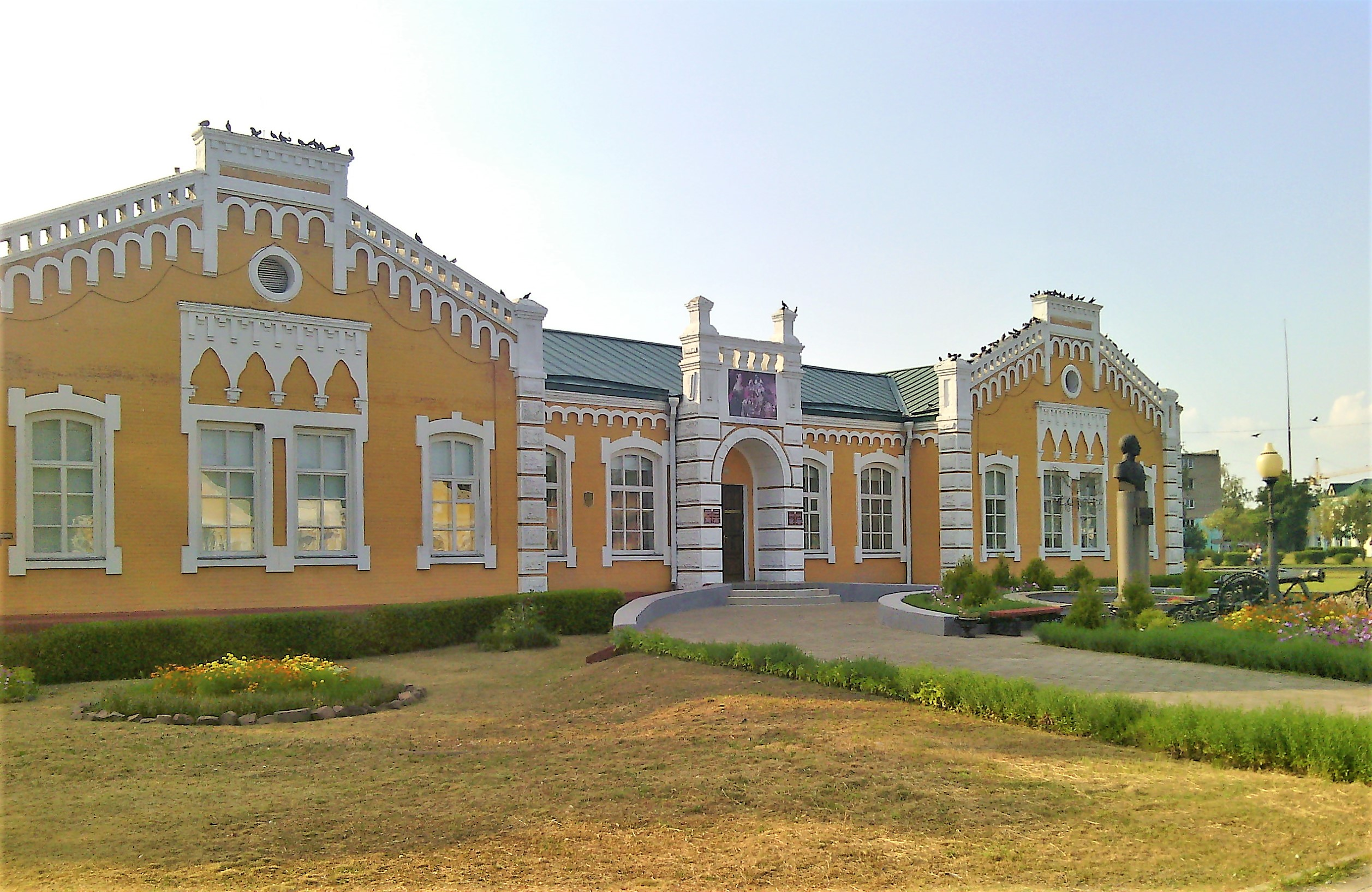 Dobruš, Belarus